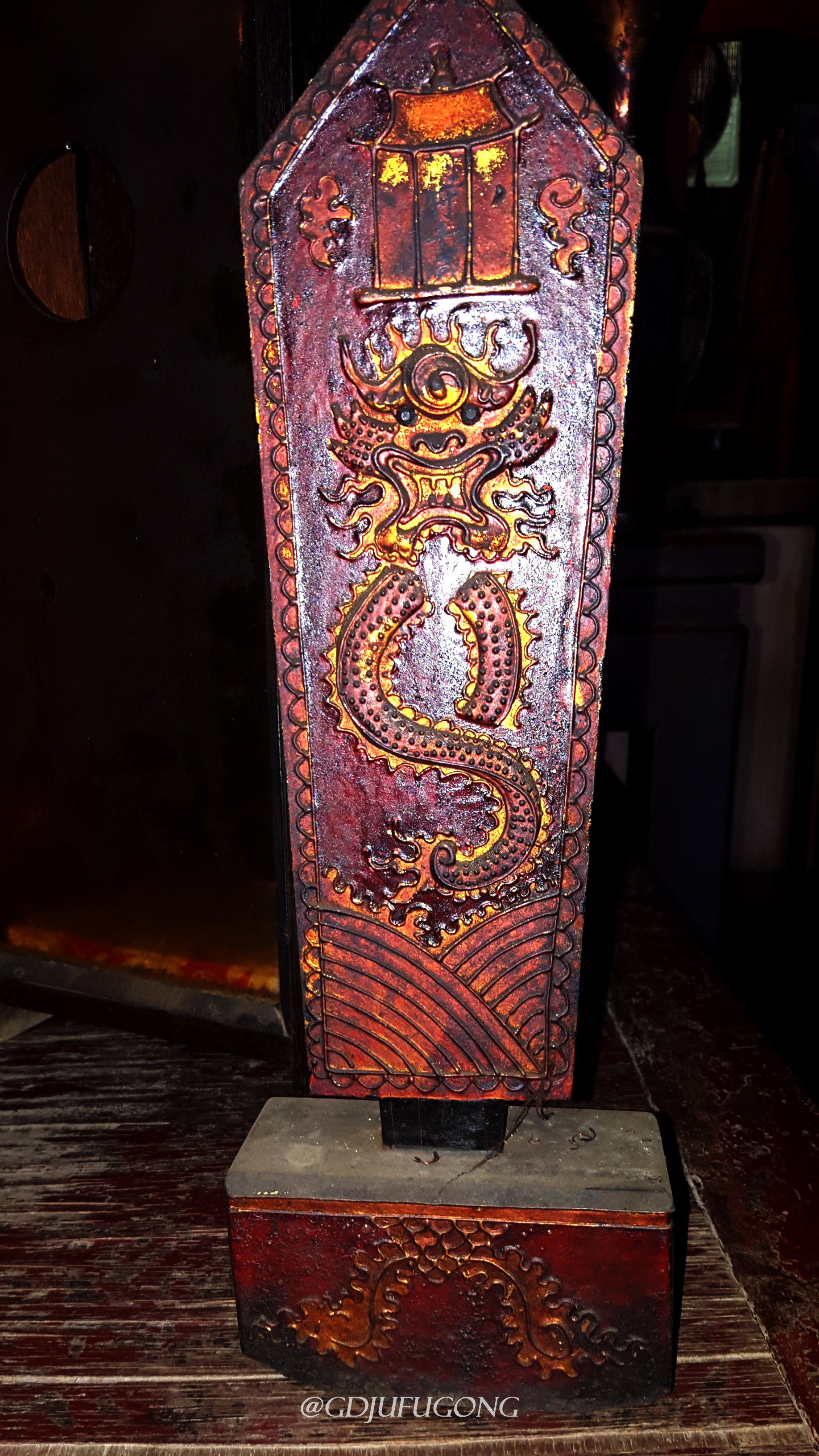 中文（台灣）: 港東聚福宮封府千歲令牌